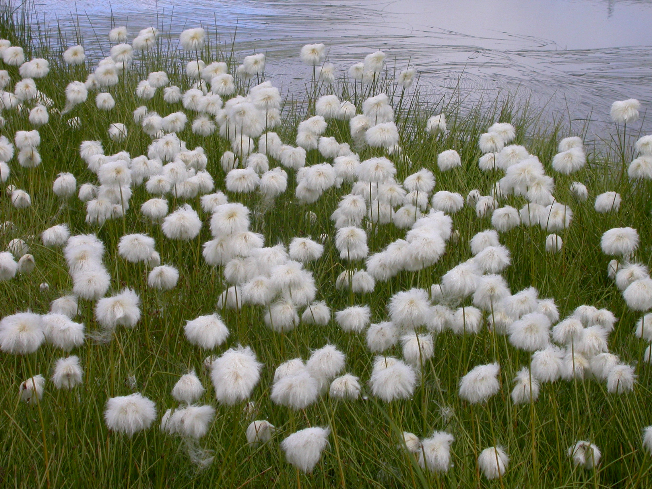 Eriophorum scheuchzeri Zermatt, Riffelsee (Kanton Wallis, Switzerland), 2700 m Author: Barbara Studer – own photograph Date: 2.08.06